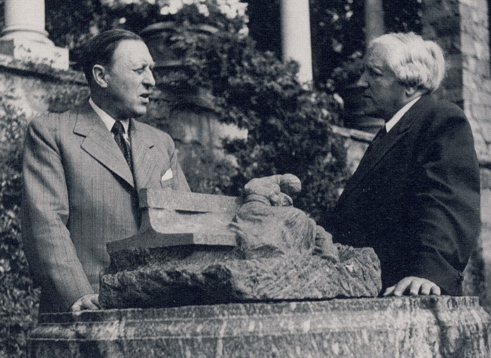 Evert Milles (vänster) och Carl Milles 1947 på Millesgården